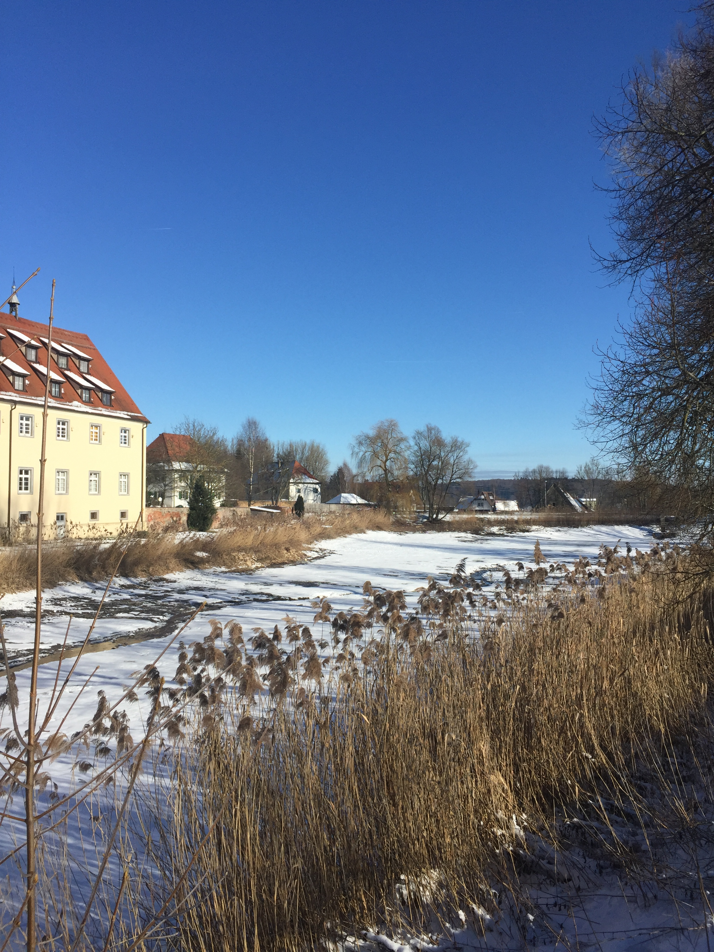 Klosterweiher in Wald, Winterung